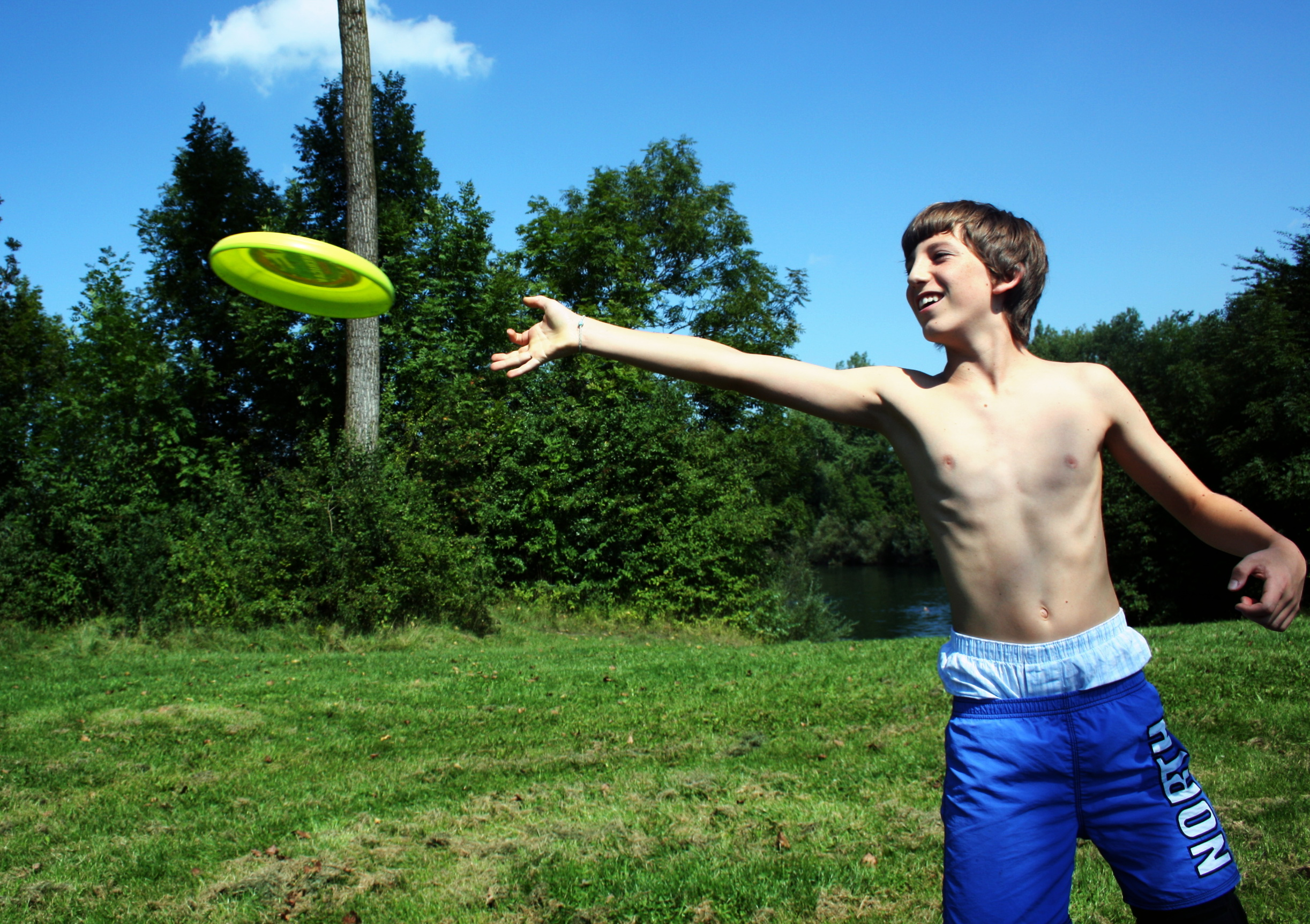 Wurf einer Frisbee-Scheibe an einem Badeplatz.